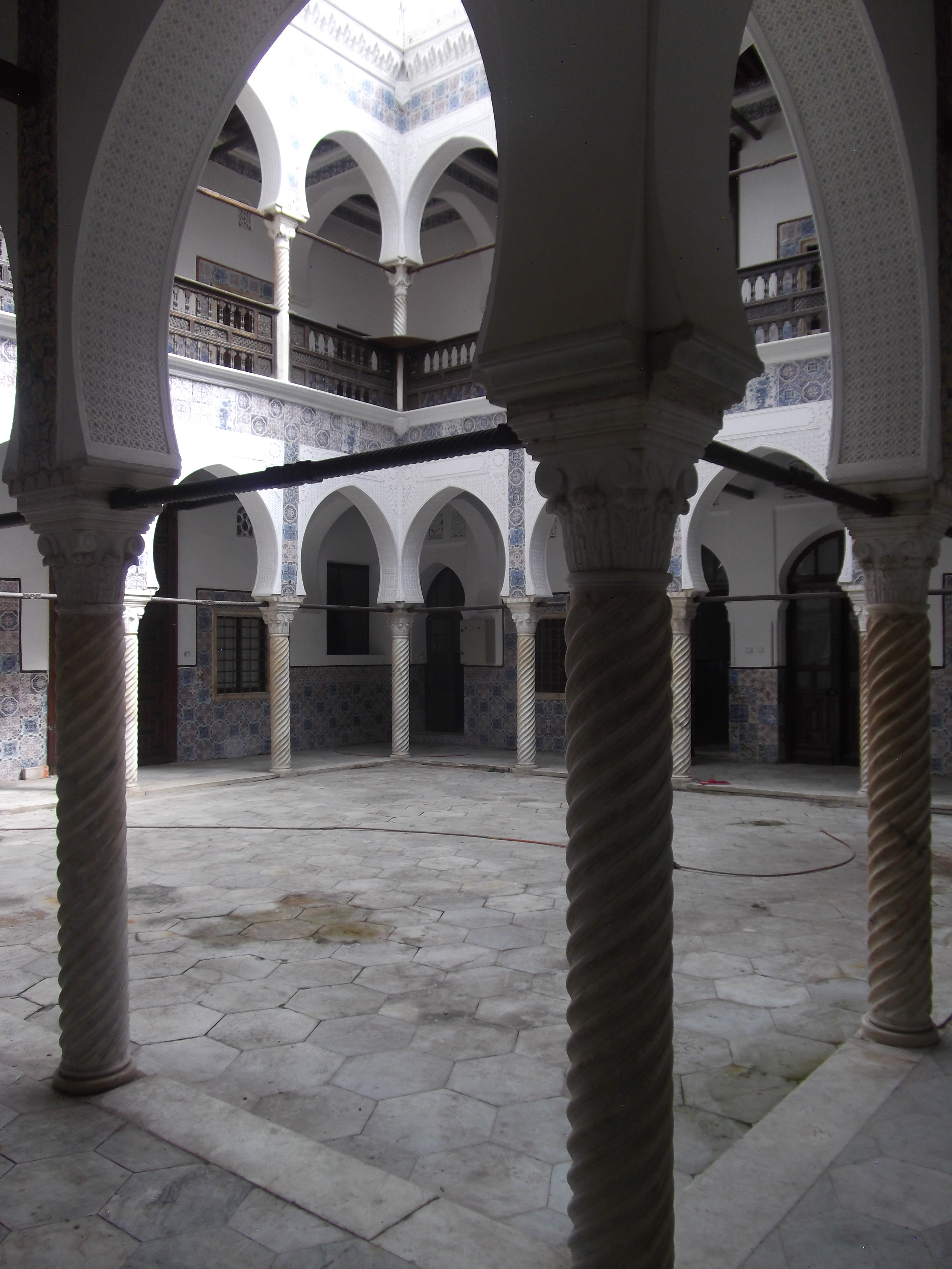 Les galeries entourant le patio du palais Hassan Pacha. Palais d’art mauresque, Dar Hassan fut construit vers 1790 comme résidence personnelle de Hassan Pacha trésorier du dey d'Alger. Plus tard il fut défiguré par des aménagements modernes commencés en 1839. Il servit alors de Palais d’hiver, sous le nom de Palais Bruce, aux gouverneurs généraux français jusqu’aux années 1950.